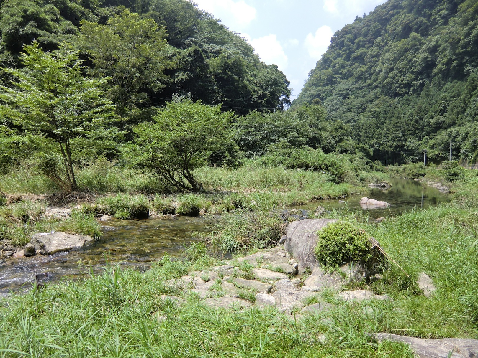 佐波川の関水跡（山口市徳地）